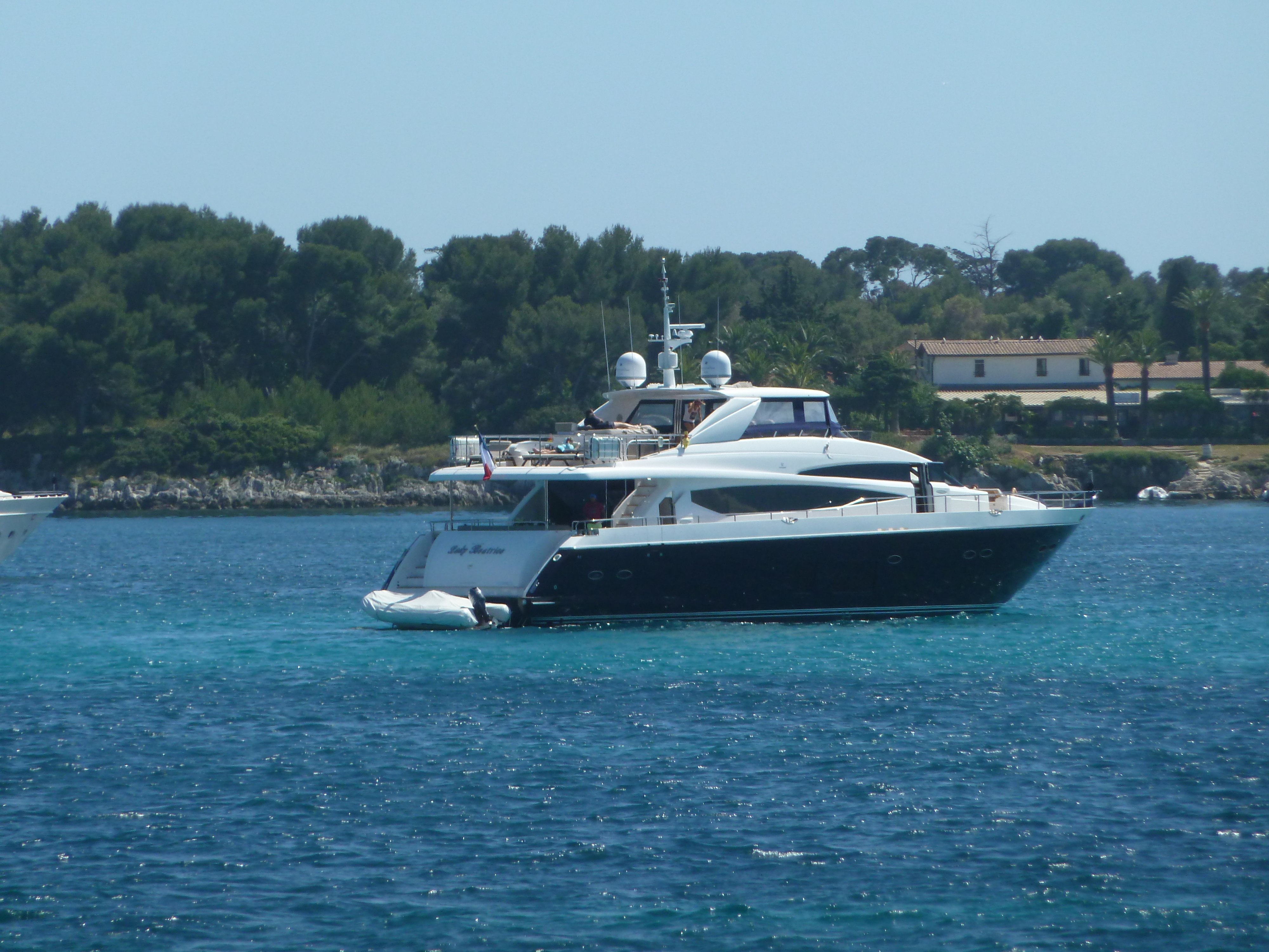 Princess yacht "Lady Beatrice" imm Cannes